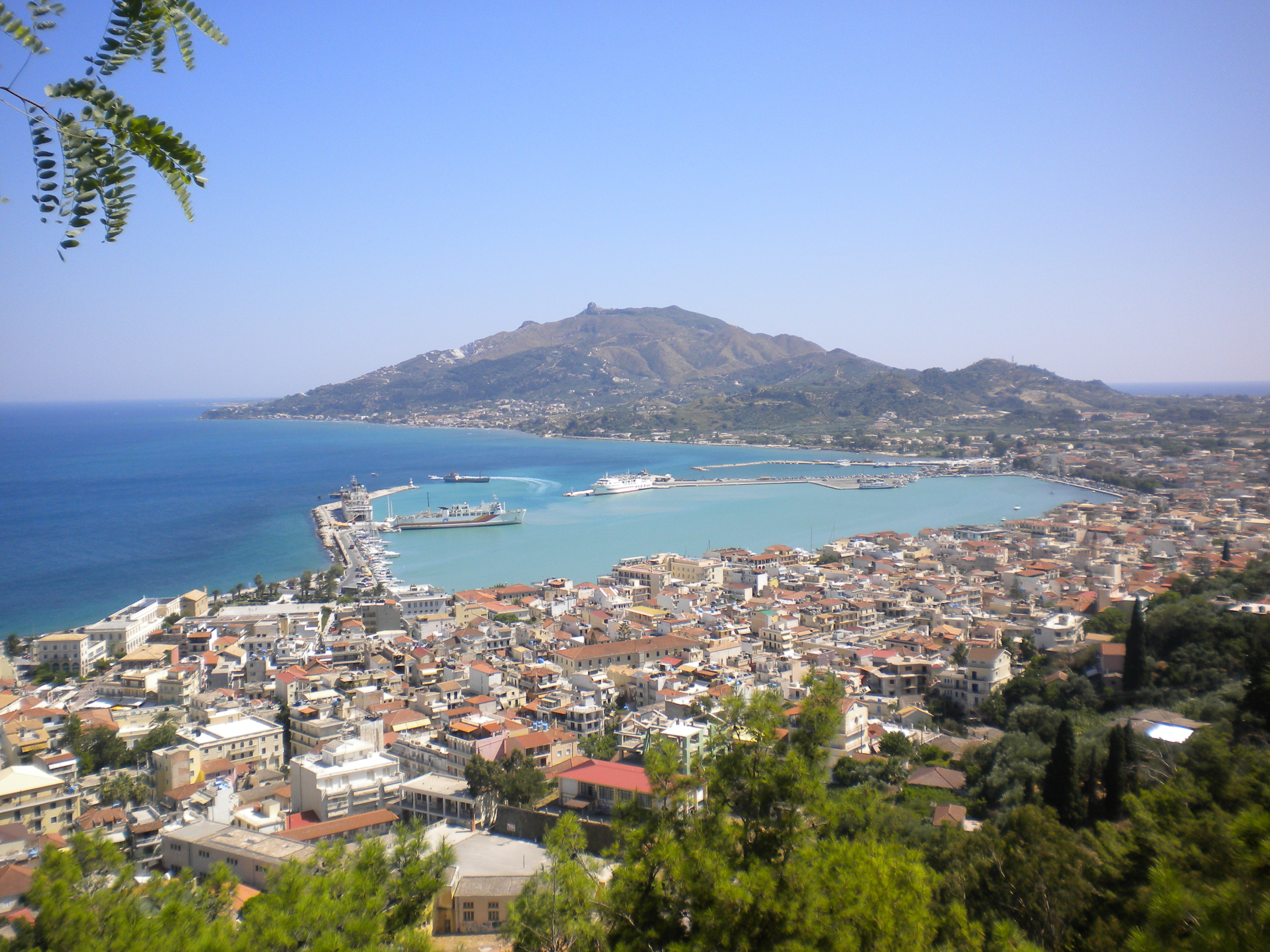 Foto, scattata da me ad Agosto 2009, da Bochali verso Zante.